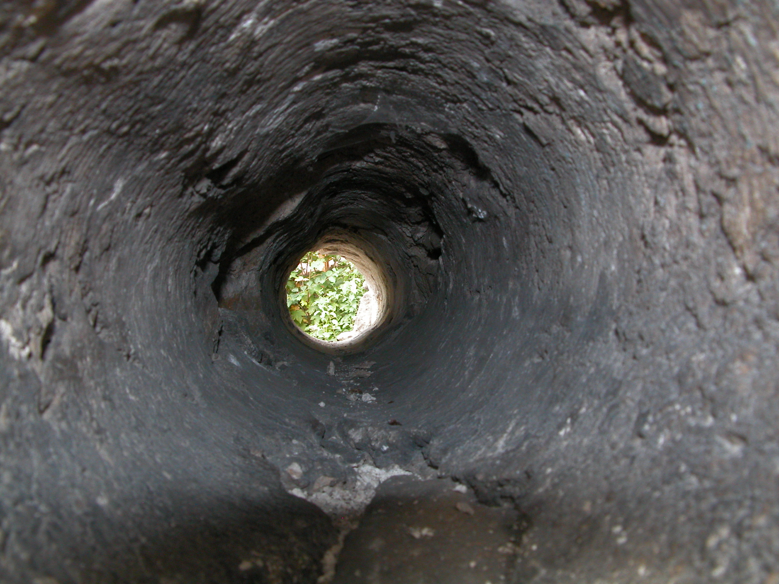 Jeden z lepiej zachowanych stacjonarnych imagineskopów murowanych ;-) Jego obecność w murach zamku przeczy tezie Śledzia Otrembusa Podgrobelskiego, że na terenach górskich, imagineskopy weszły w szersze użycie dopiero podczas wędrówek pasterskiej ludności wołoskiej i że używano tu jedynie imagineskopów wykonanych z drewna świerkowego (Podgrobelski Śledź Otrembus 2009: Wstęp do imagineskopii. Próba zarysu. Wydanie IV przejrzane i nie poprawione. Pruszków, 200 stron)